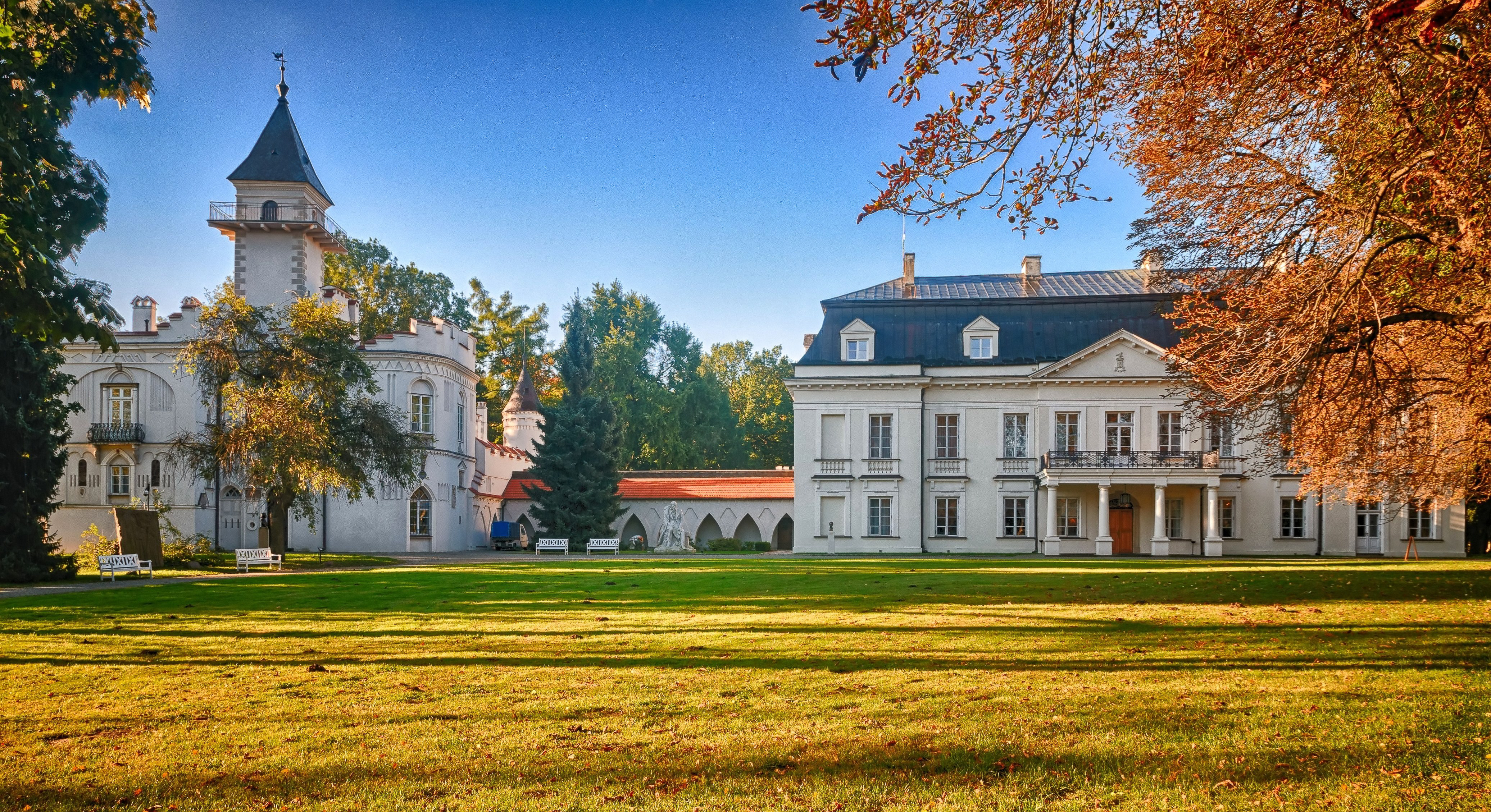 zespół pałacowy, XVI, XVII-XIX: pałac, nr rej.: 150/32/58 z 20.06.1958 dwór, nr rej.: 756 z 22.03.1966 stajnia, nr rej.: 762 z 1.12.1966 Radziejowice, Radziejowice